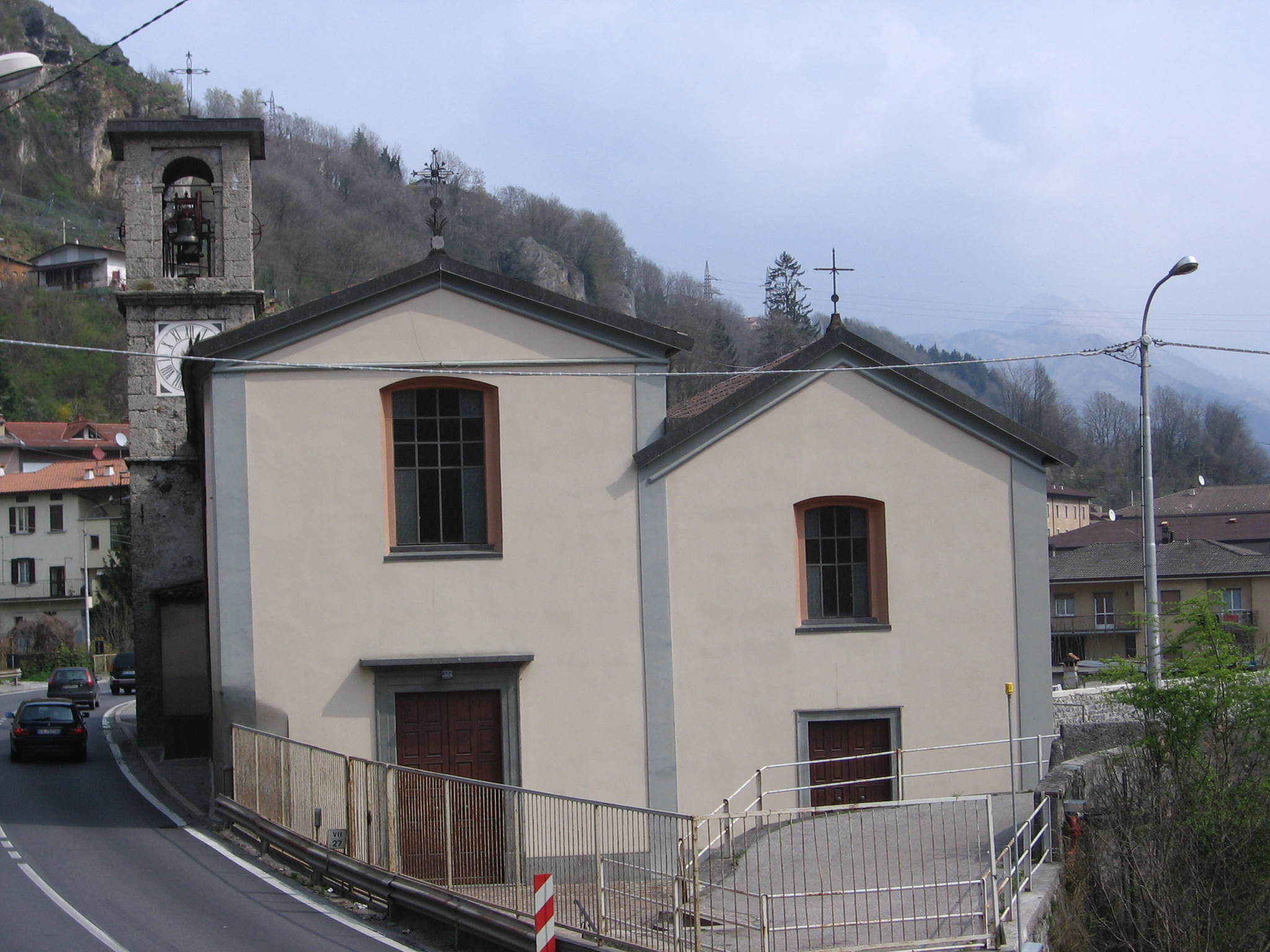 Chiesa di san Bernardino. Ponte Nossa (BG) , Italia